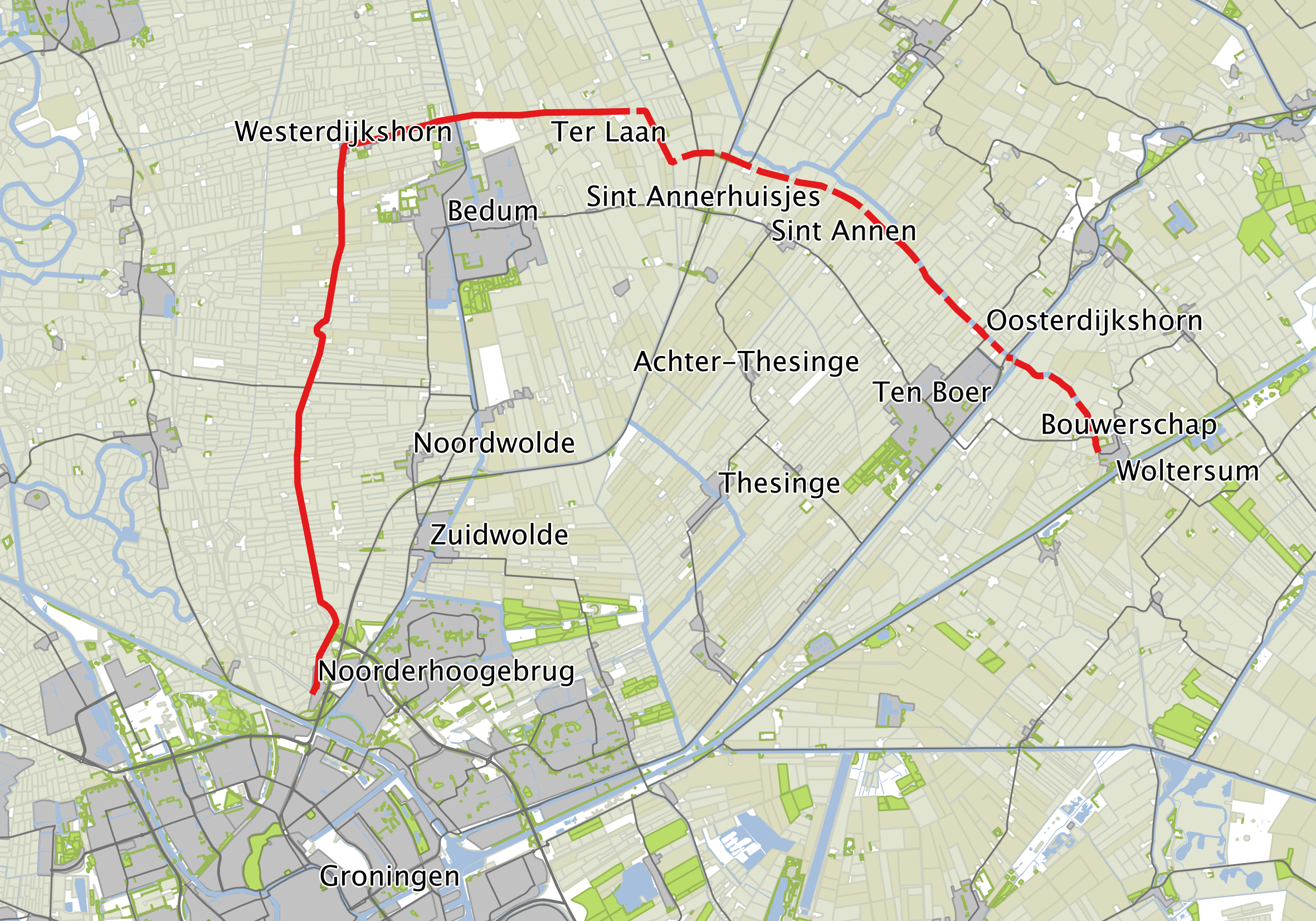 De Wolddijk is vroeg-middeleeuwse dijk die om het lage gebied ten noorden van de stad Groningen is gelegd. Dit gebied, dat wel wordt aangeduid met het Woldgebied, omvatte de schepperijen Innersdijk in Hunsingo en Vierendeel in Fivelingo. Kaartbeeld samengesteld op basis van OpenStreetMap data (vrijgegeven onder de Open Data Commons Open Database licentie) Bestaande dijk Verdwenen dijk